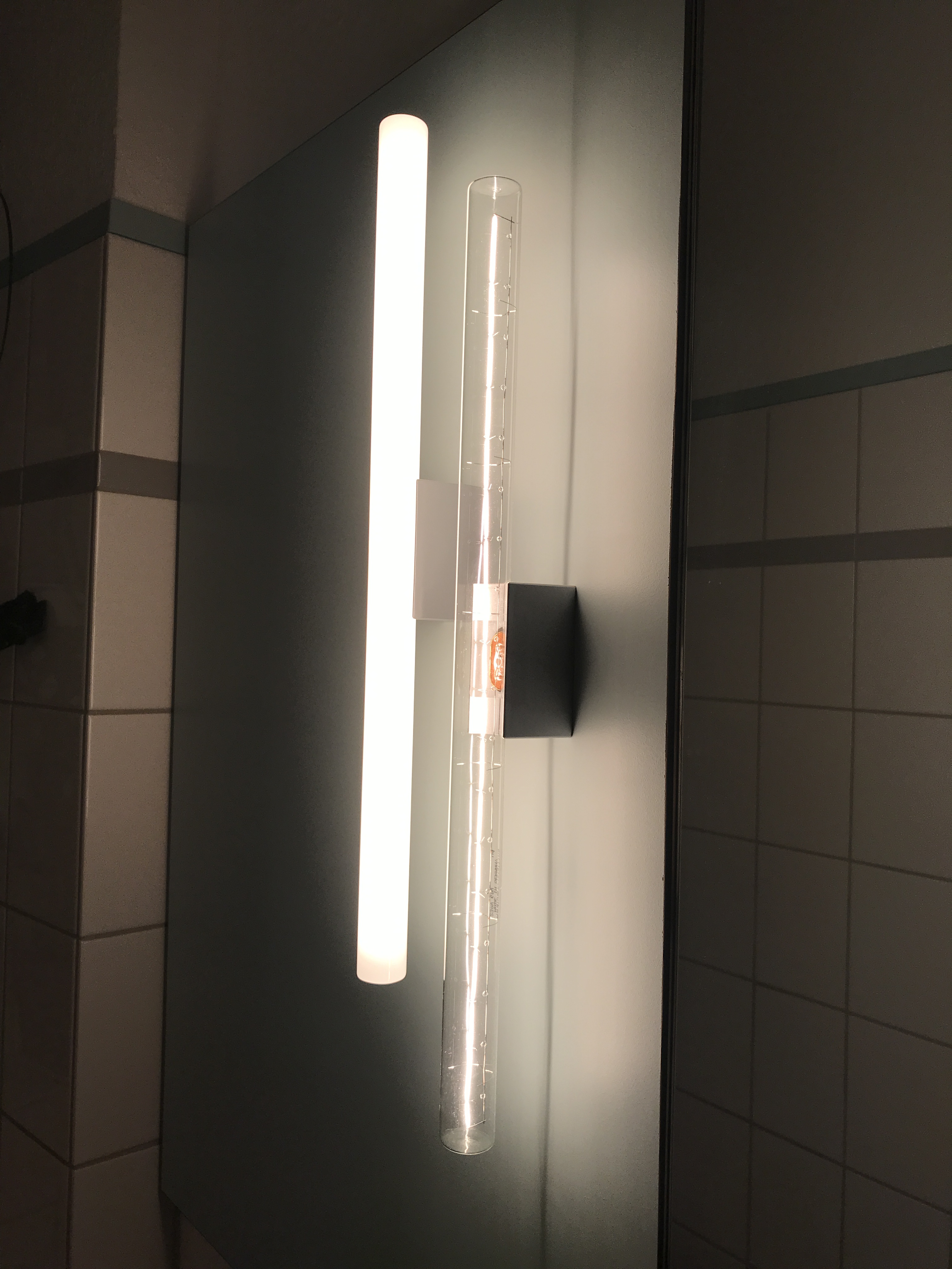 Zwei Osram LINESTRA Linienlampen mit Sockel S14d je einmal opal und transparent. Zwei Osram Fassungen 670 hellgrau (ohne Schalter wie 675).